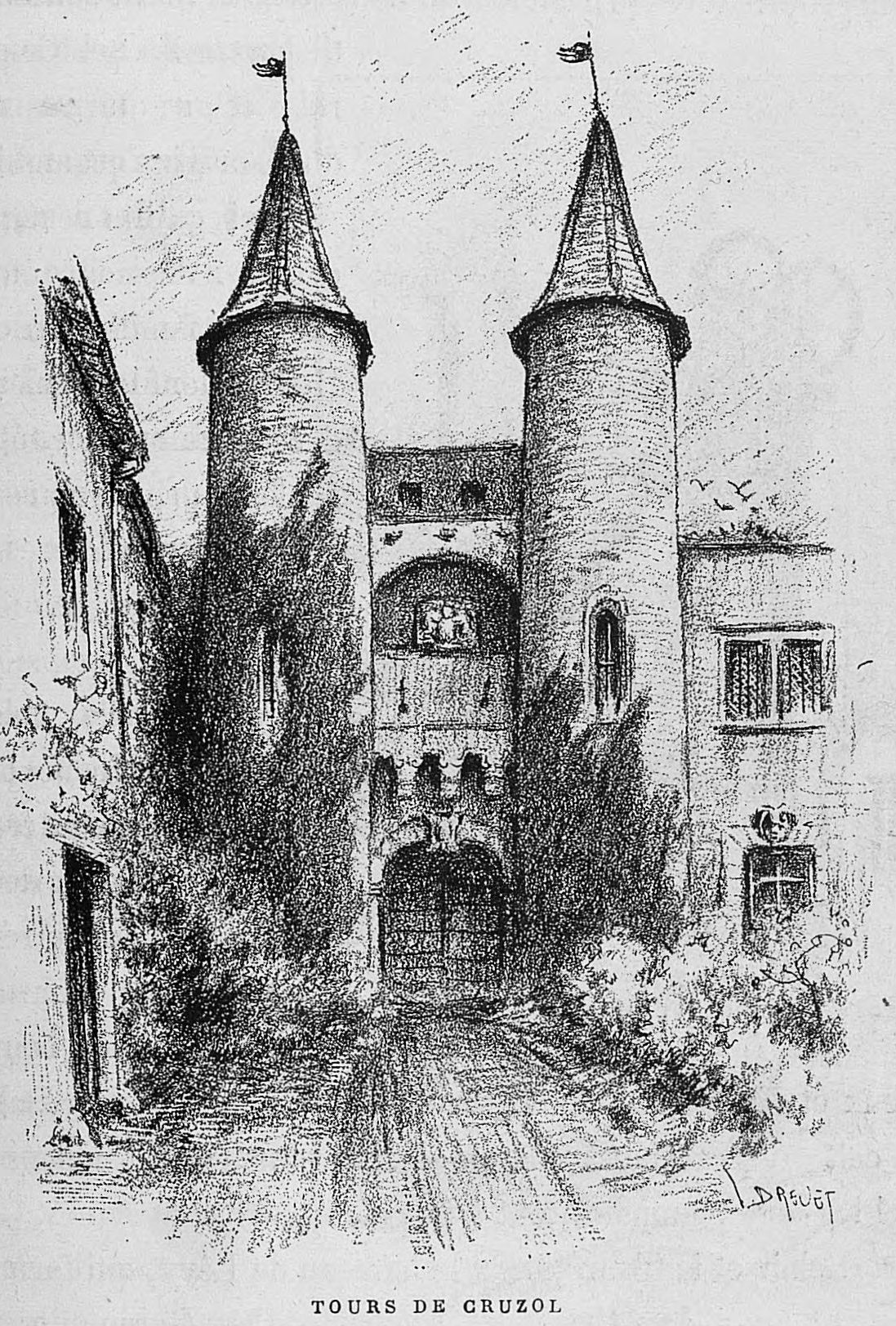 Aux environs de Lyon / Monsieur Josse ; préface de M. Coste-Labaume ; édition illustrée de 250 dessins de J. Drevet.